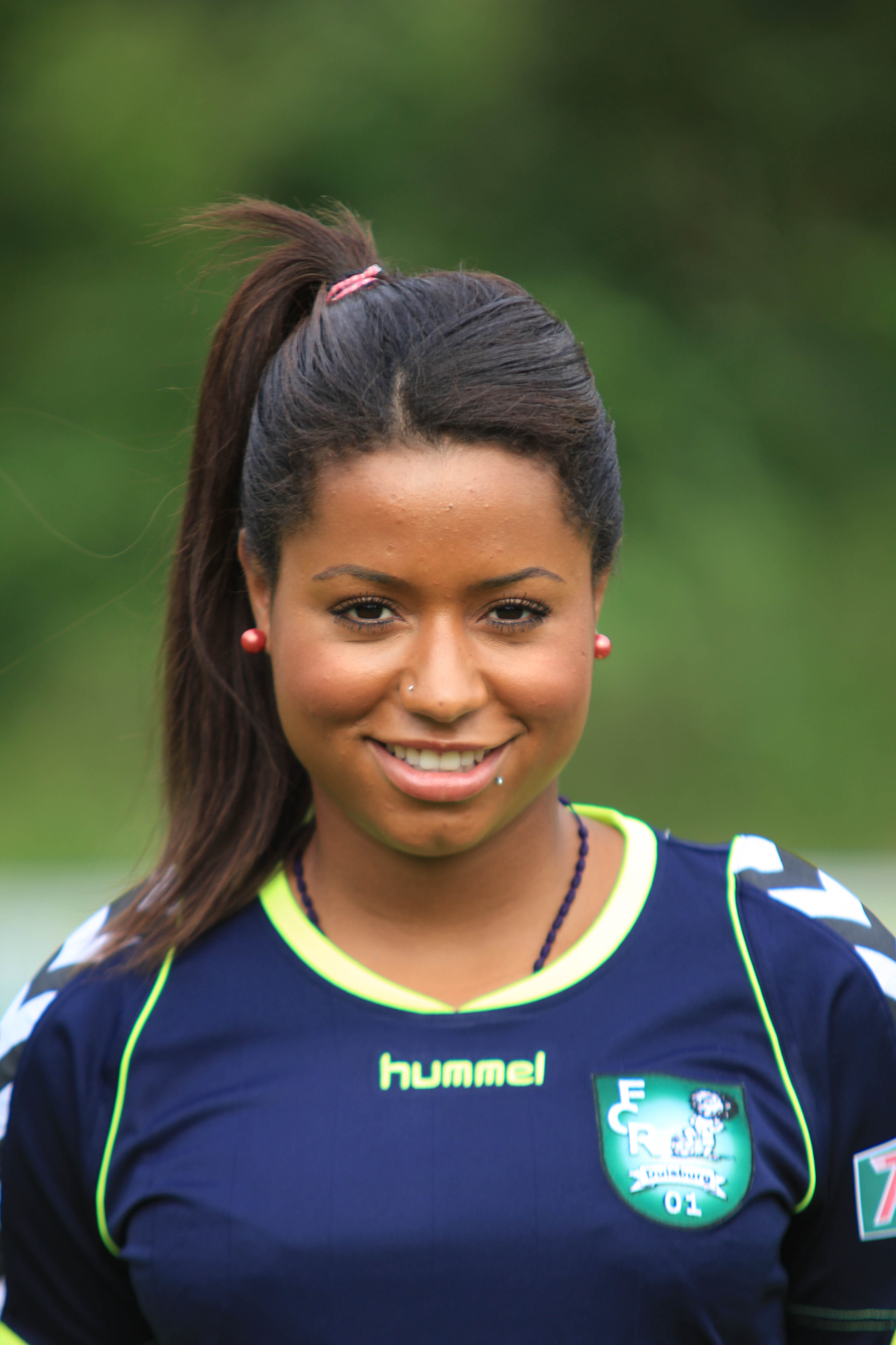 Nicole Banecki, FCR 2001 Duisburg